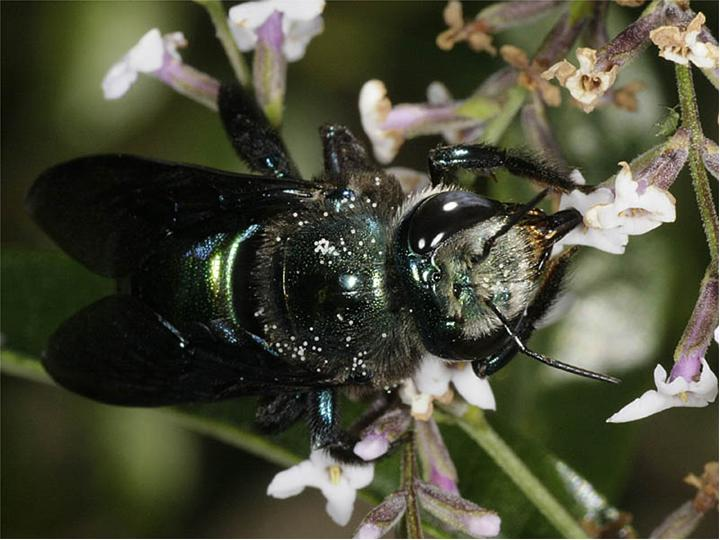 Xylocopa aeratus male on Aloysia citrodora